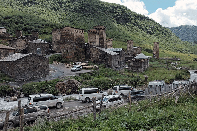 Blick auf den UNESCO-Welterbe-Ortsteil mit parkenden Fahrzeugen für Tagesausflügler von Mestia nach Ushguli.